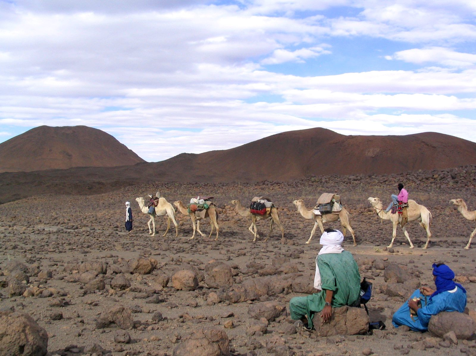 Caravane de chameaux dans le Hoggar